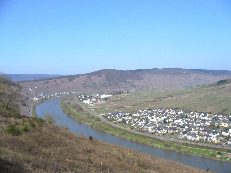 Blick auf Rachtig un Ürzig